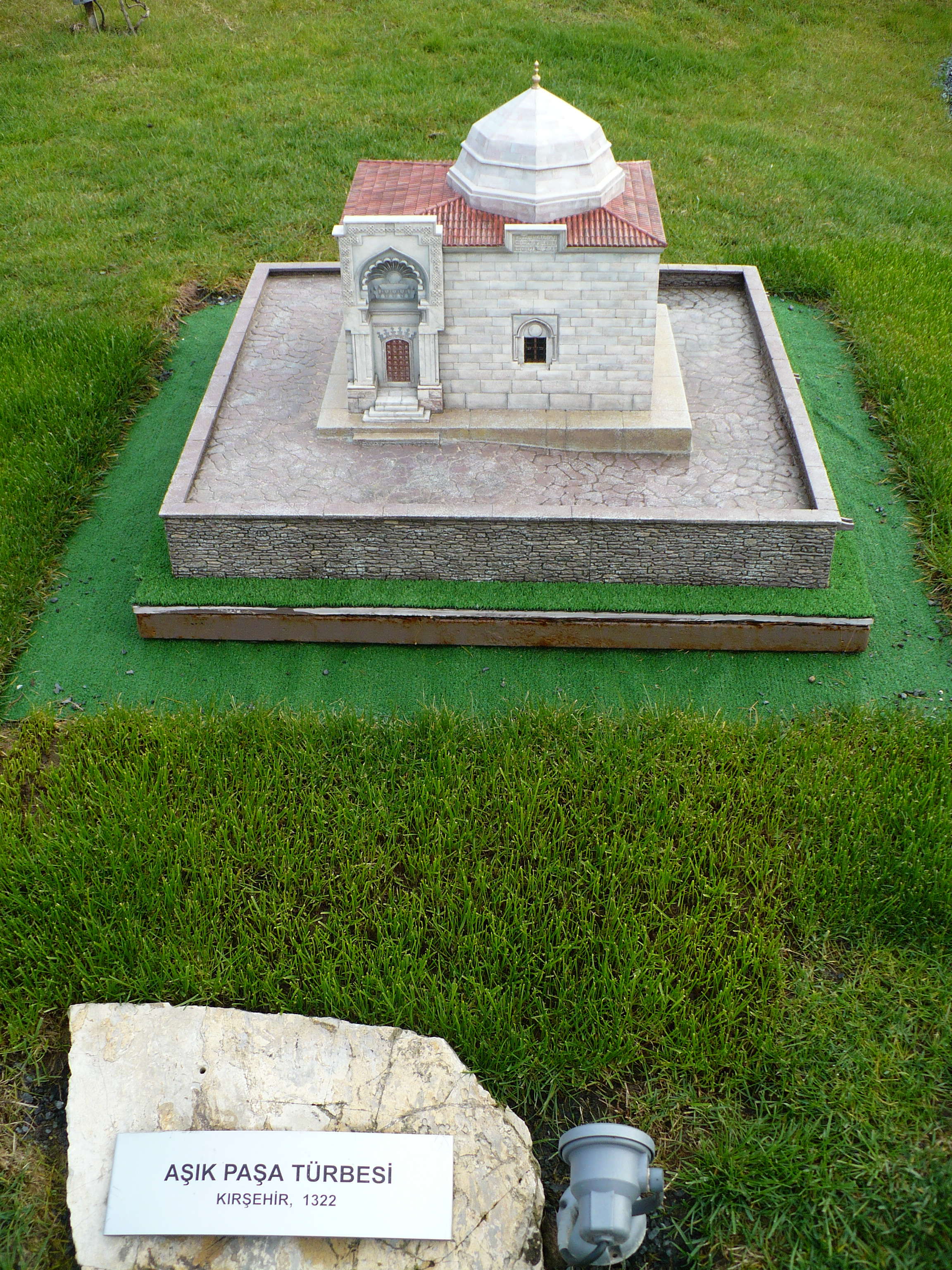 Âşık Paşa adlı şairin Kırşehir'de bulunan türbesinin, İstanbul Miniatürk'te bulunan maketi.